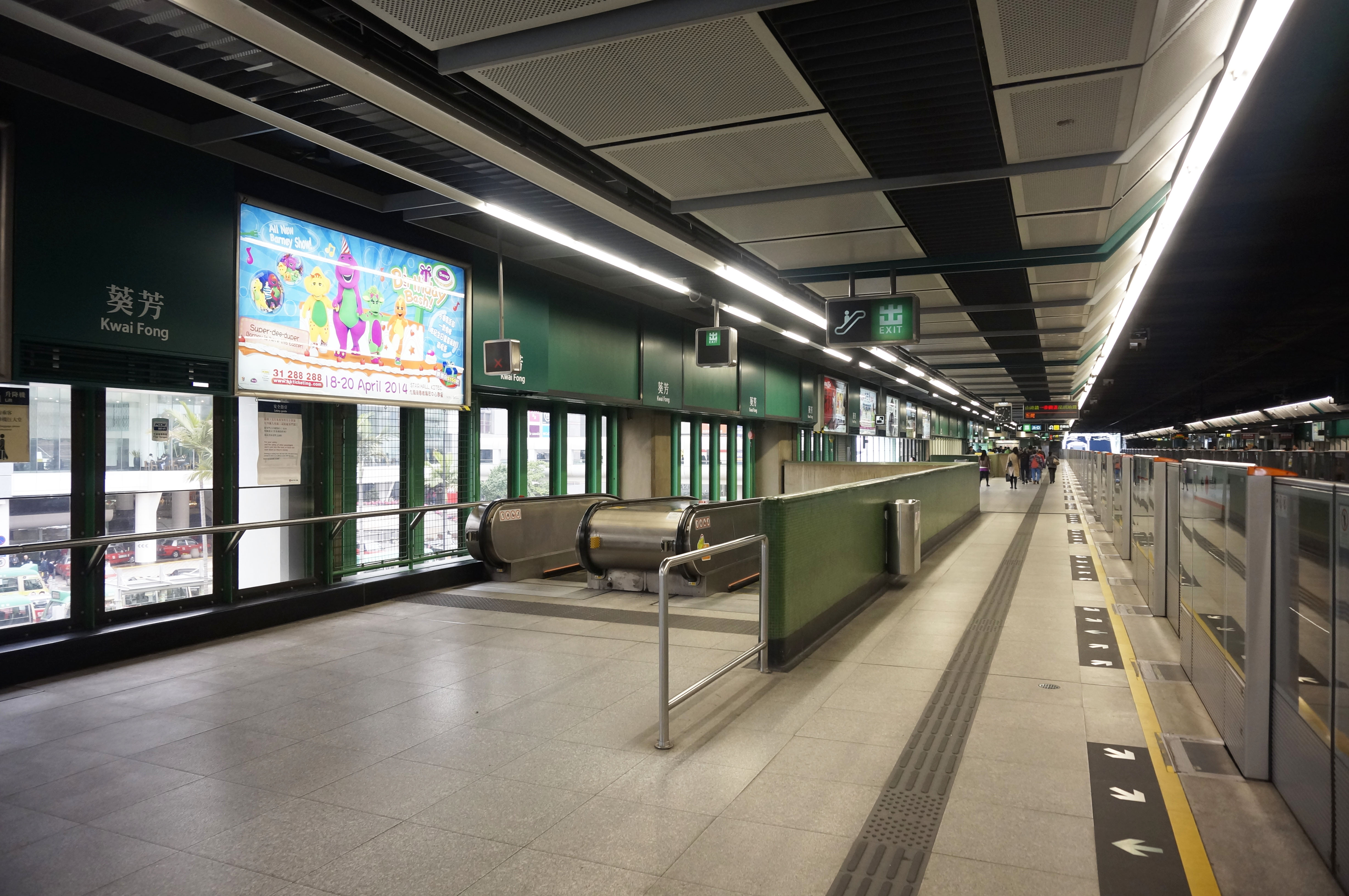 中文（香港）: 港鐵葵芳站月台